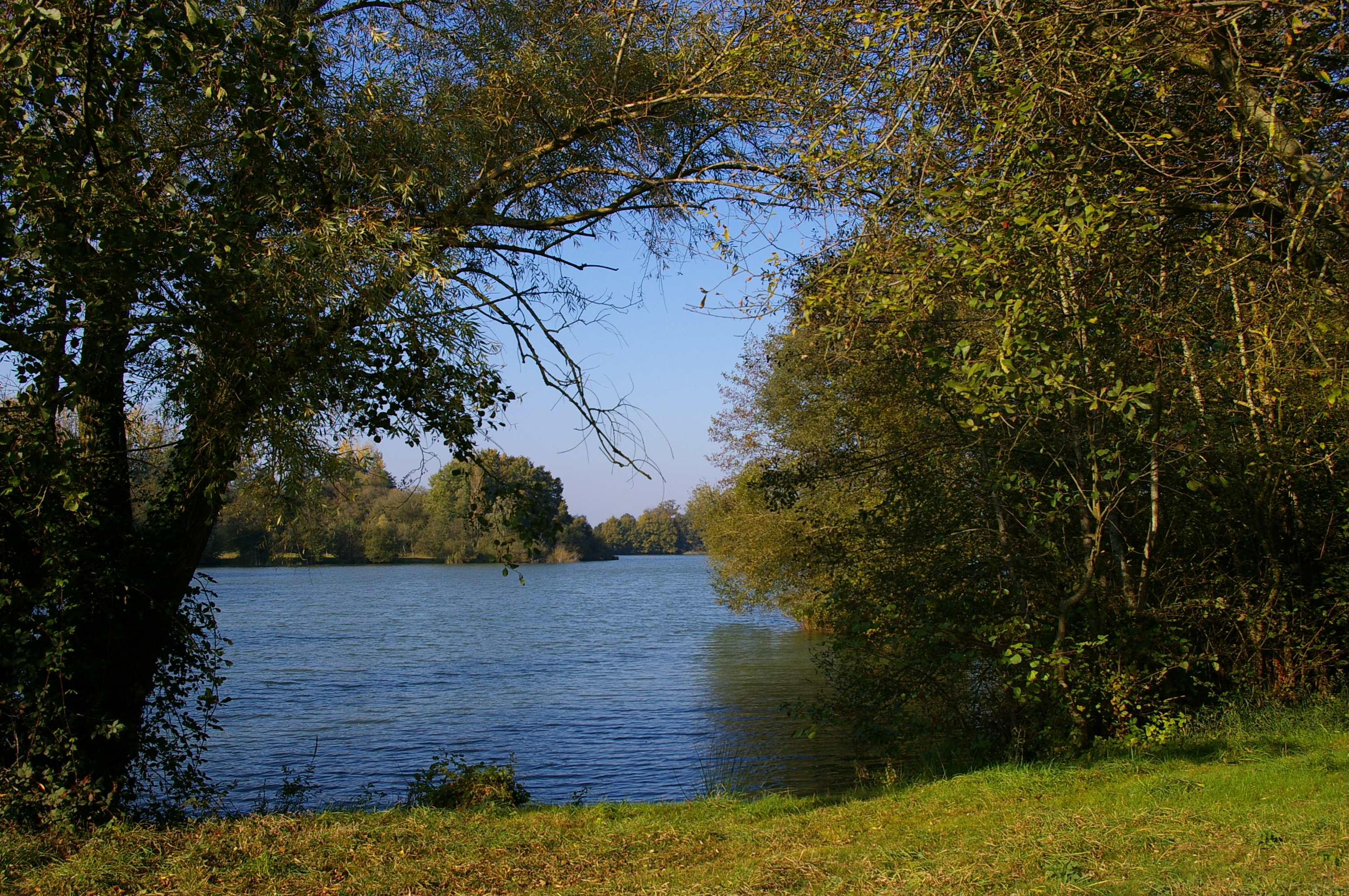 Etang_de_la_courbe_Origné